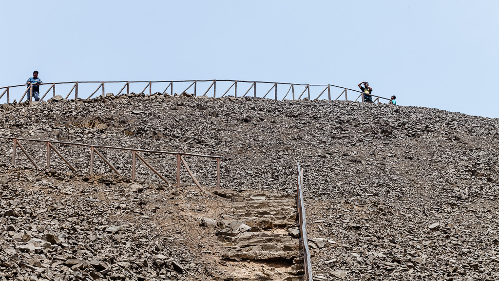 Mirador